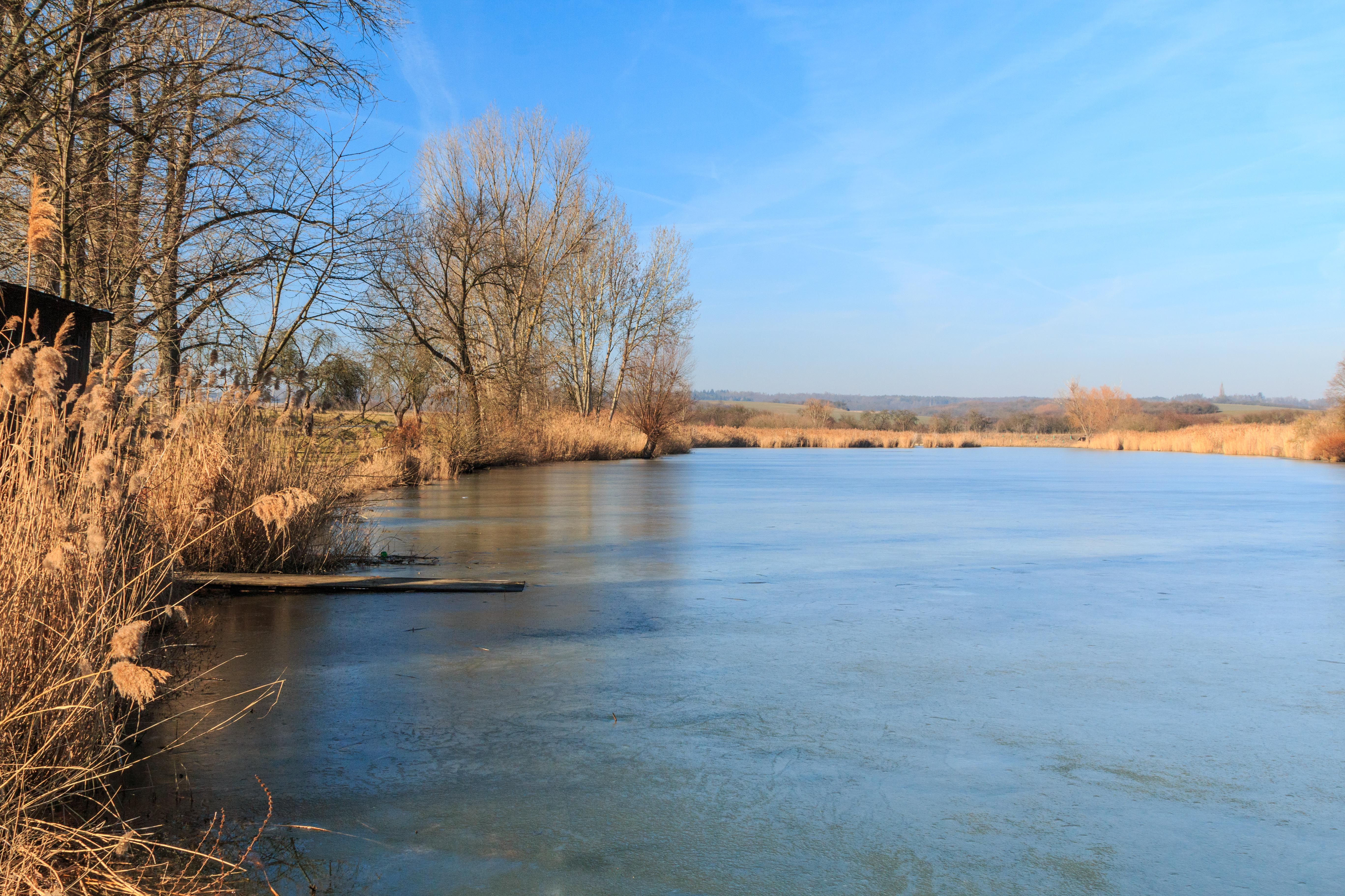 Pohled na Doubravanský rybník Project: Vodstvo Ticket: 1711.